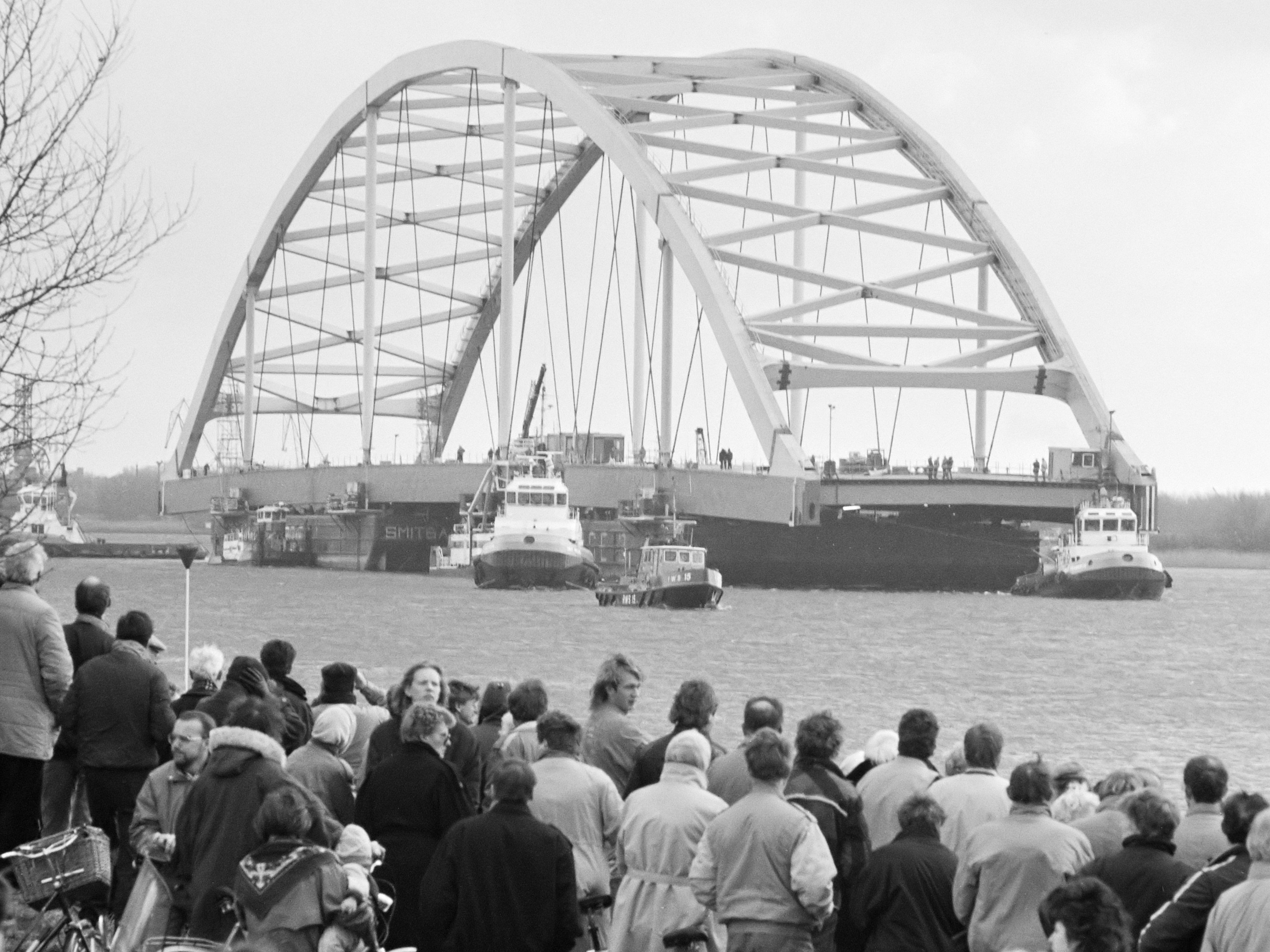 Vervoer van de 2e Van Brienenoordbrug van Zwijndrecht naar Rotterdam. Grote belangstelling bij vertrek in Zwijndrecht 16 februari 1989